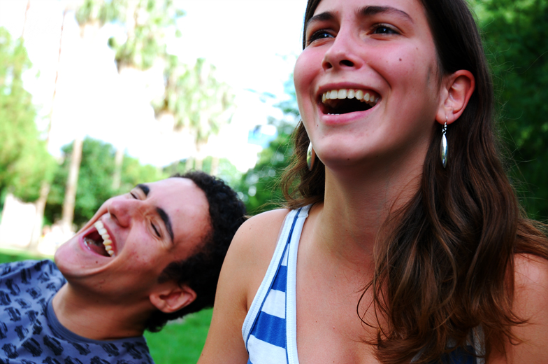 Lucas; Ana Carolina